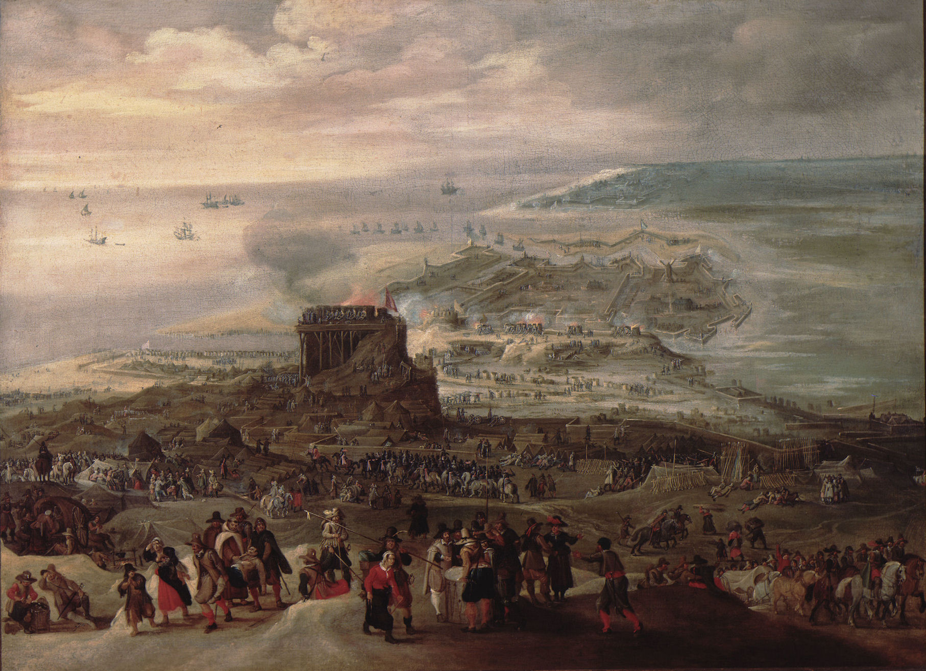 Siege of Ostend (1601-1604)